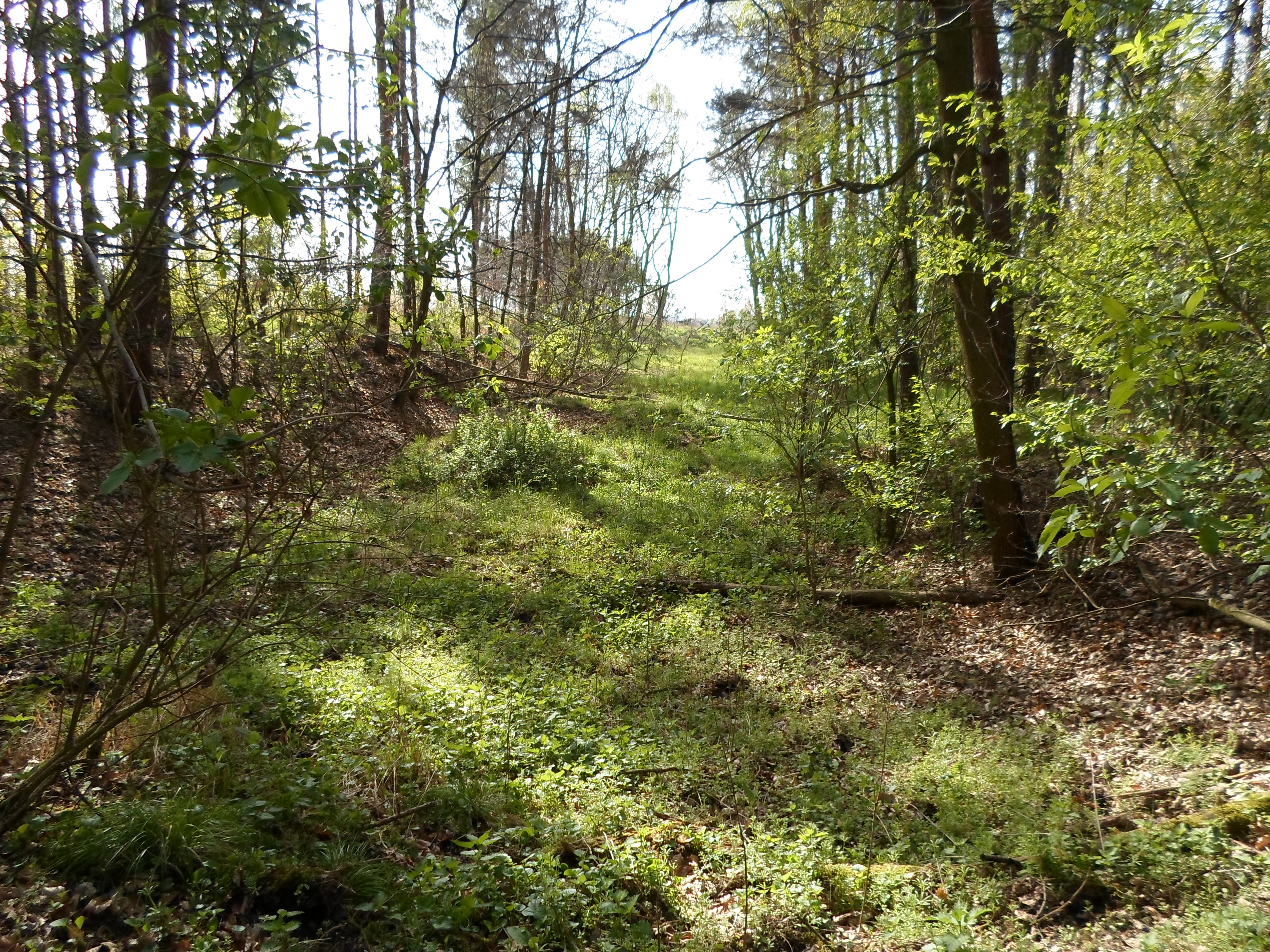 Pozostałość bocznicy kolejowej w leszczyńskiej Munie.